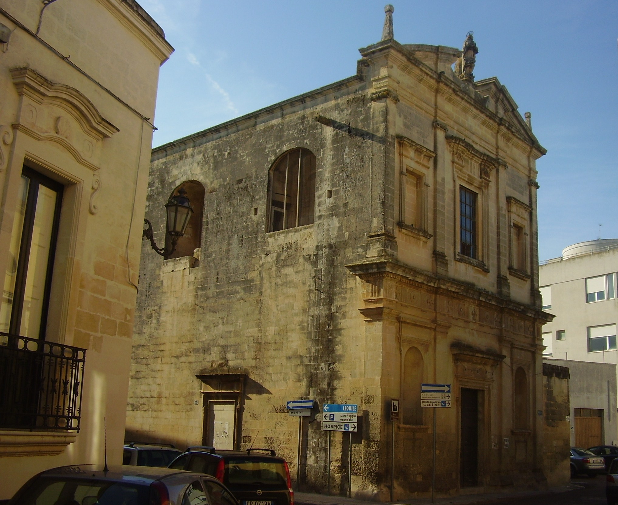 Chiesa dell'Immacolata San Cesario di Lecce